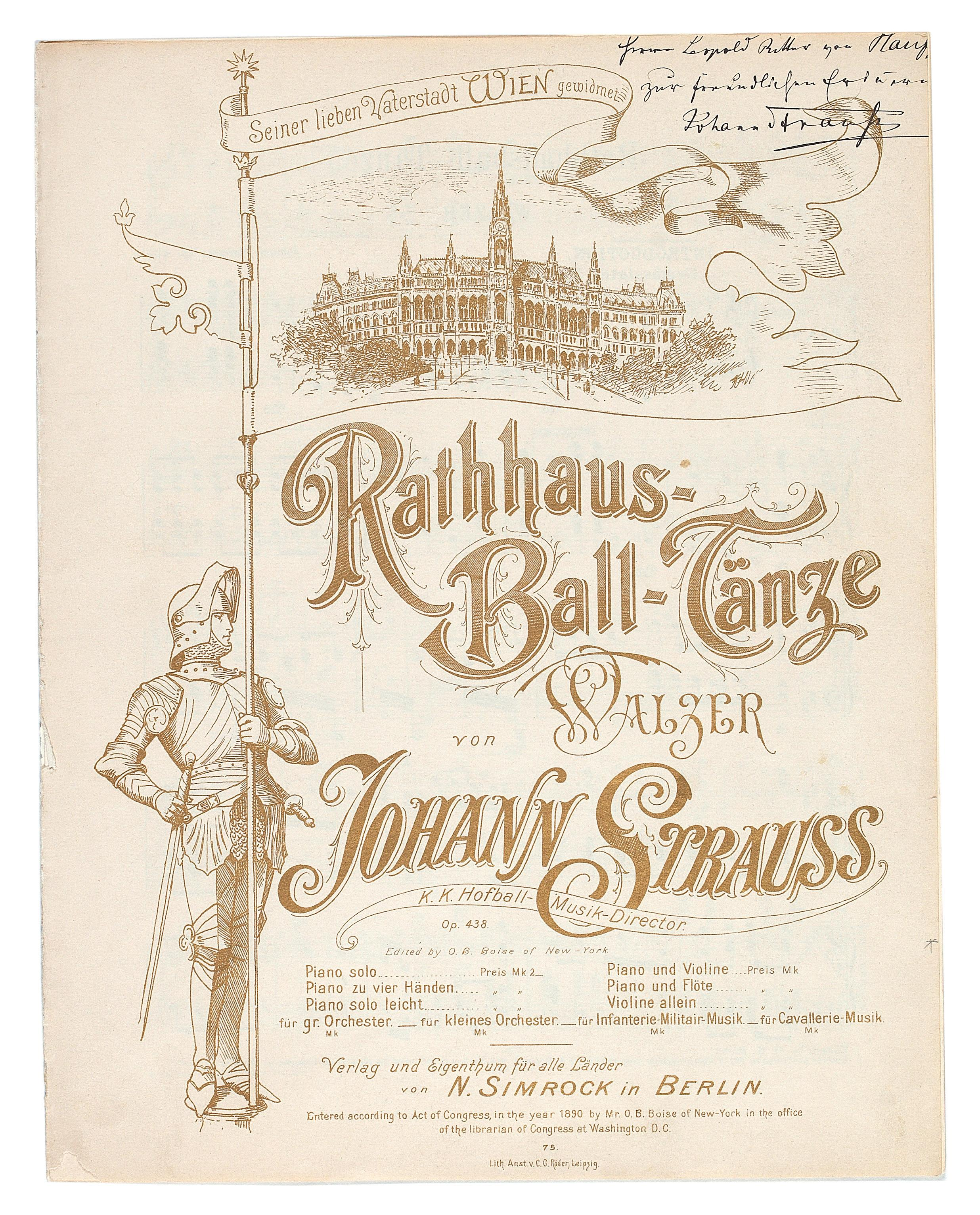 Johann Strauß, Titelblatt des Klavierauszugs der Rathaus-Ball-Tänze, Simrock, Berlin 1890, mit Widmung von Johann Strauß: "Herrn Leopold Ritter von Haupt(?) zur freundlichen Erinnerung Johann Strauß" (Widmung beschnitten)